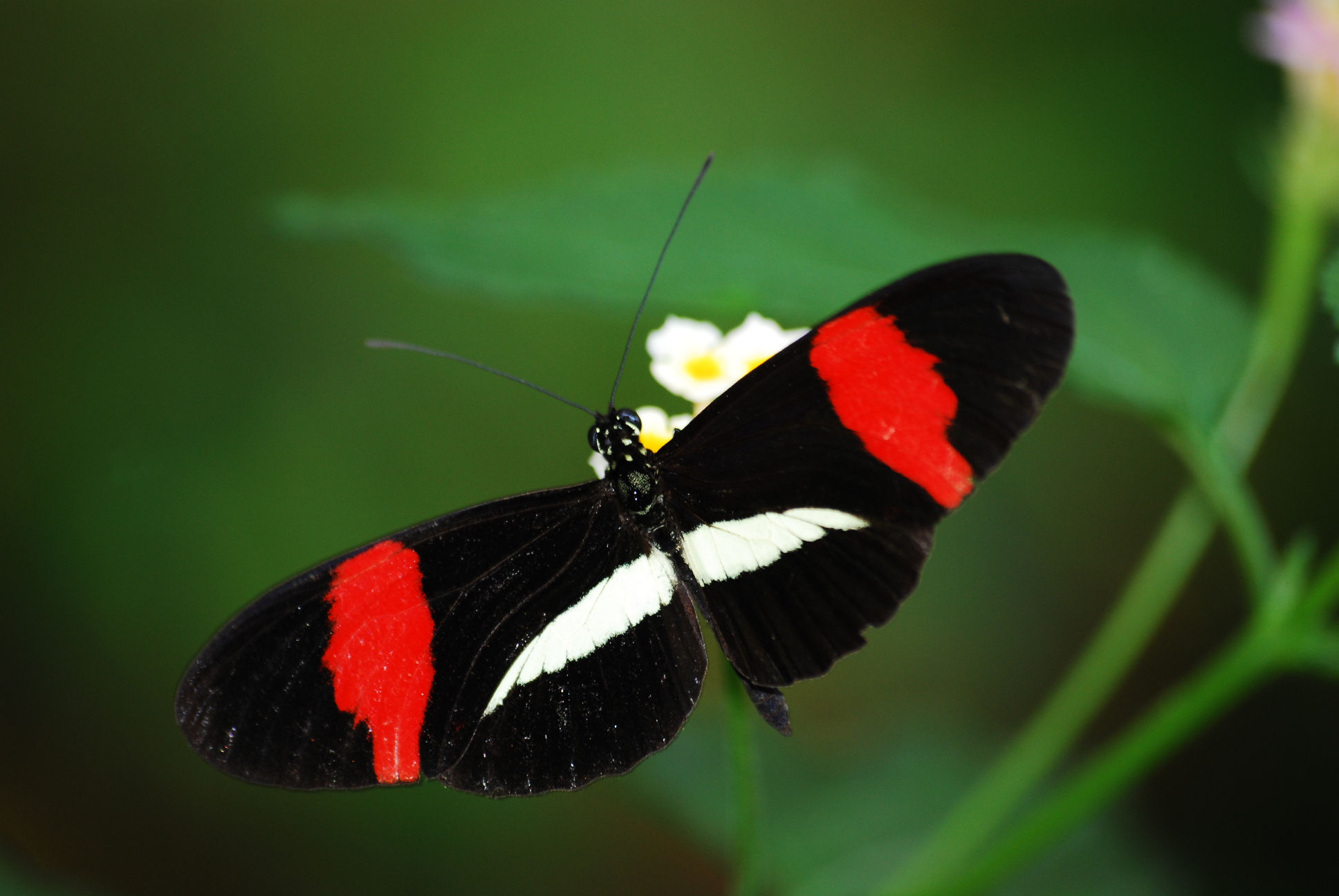 Heliconius erato in Bornholms Sommerfugelpark & Tropeland